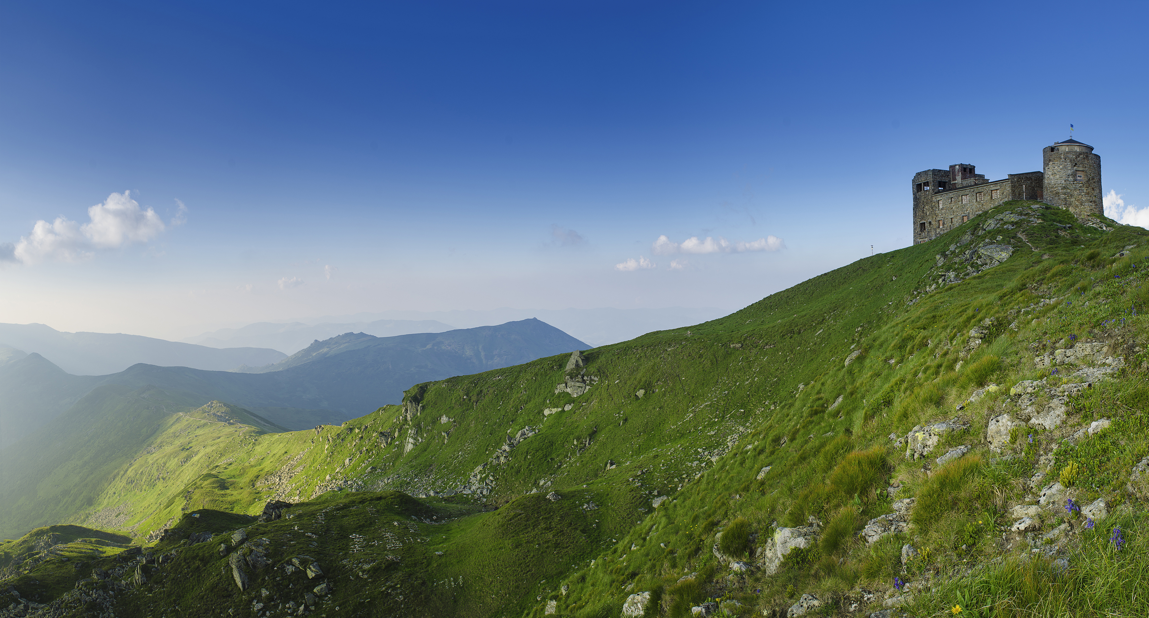 Карпатський, Яремчанська міська рада, Верховинський район, Надвірнянський район